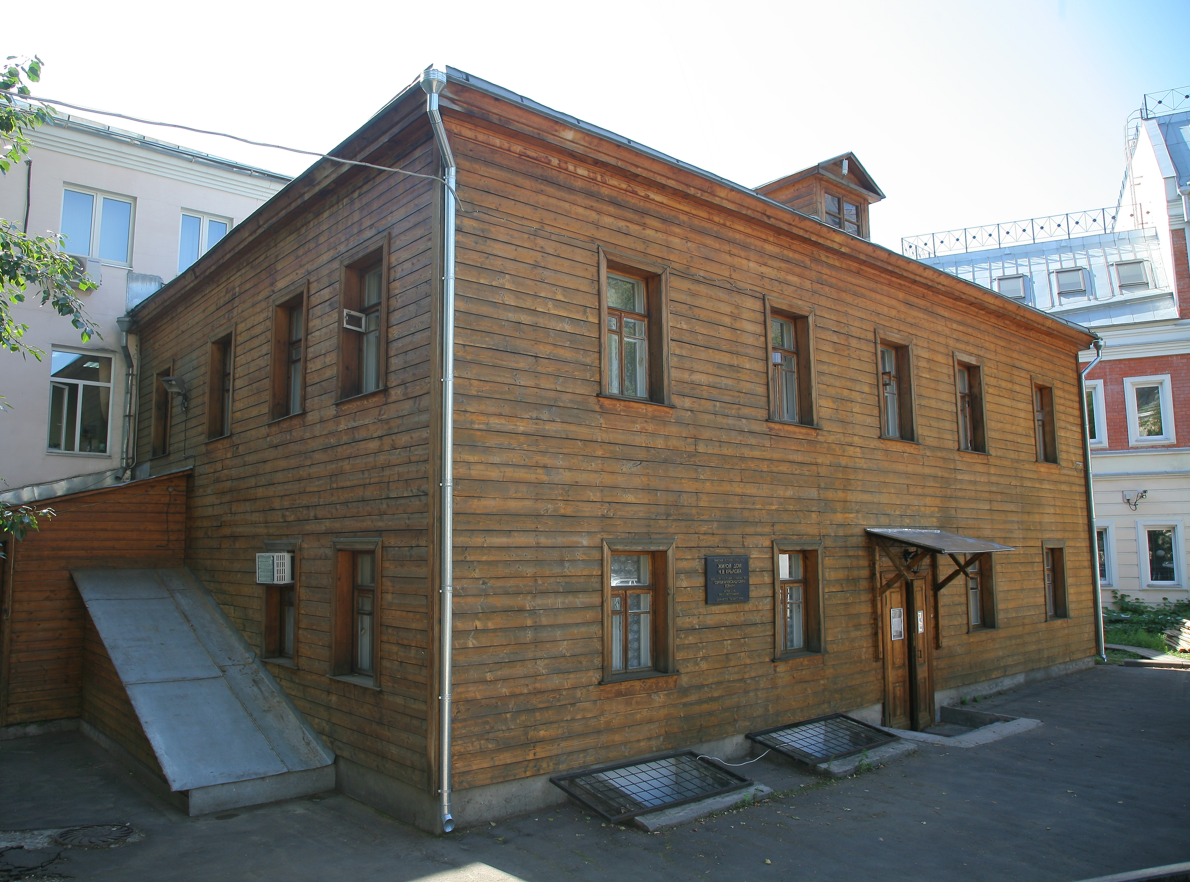 историческое здание Замоскворечья, связанное с памятью об отце Сергея Есенина, а главное – с жизнью и творчеством Поэта, который здесь был прописан с 1911 по 1918 гг.